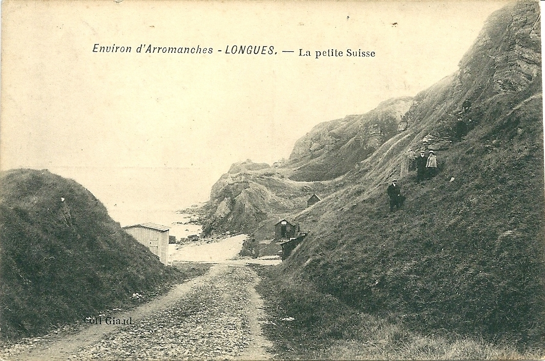 La plage